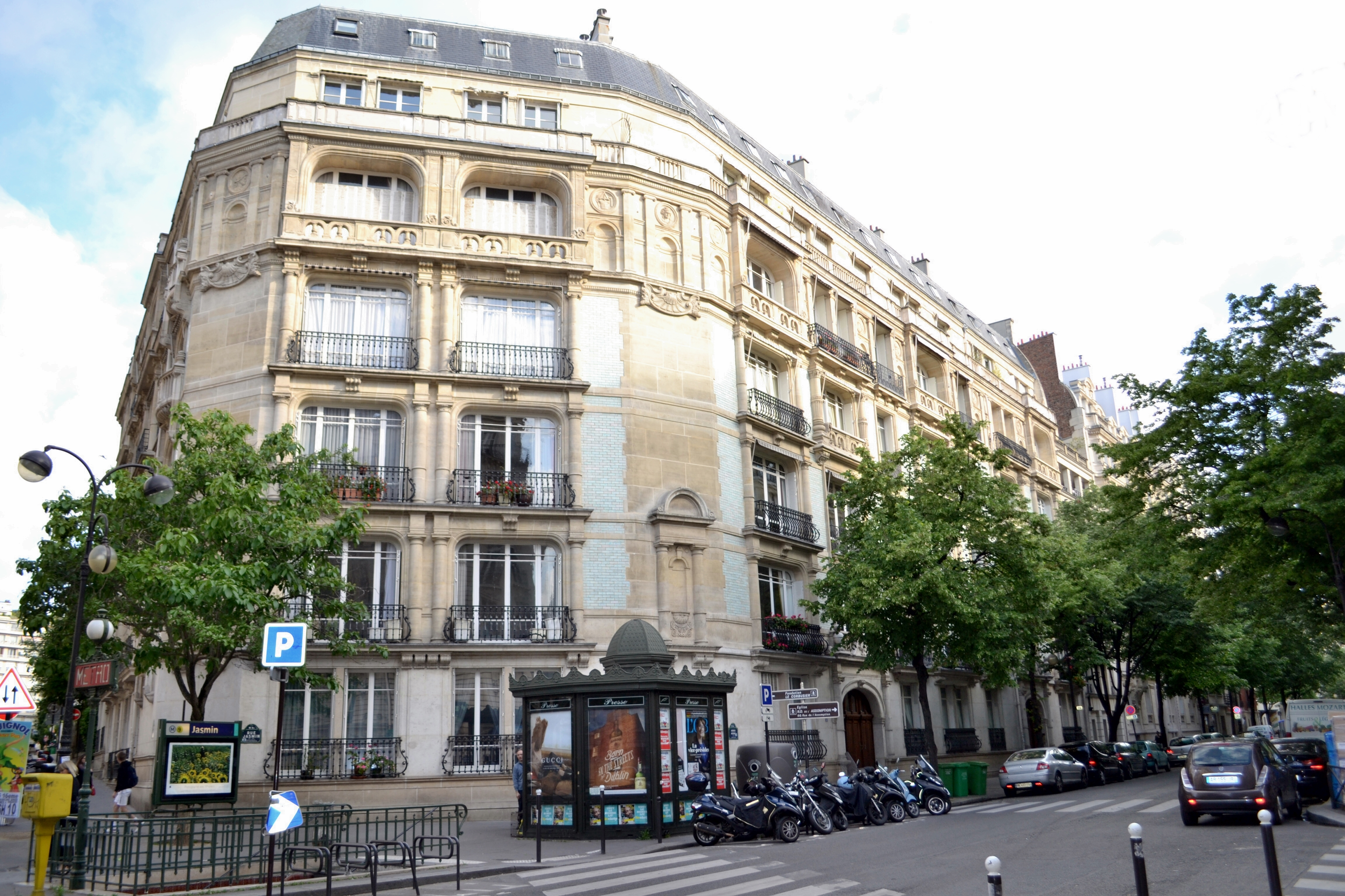 Immeuble du n° 78 de l'avenue Mozart, Paris 16e.